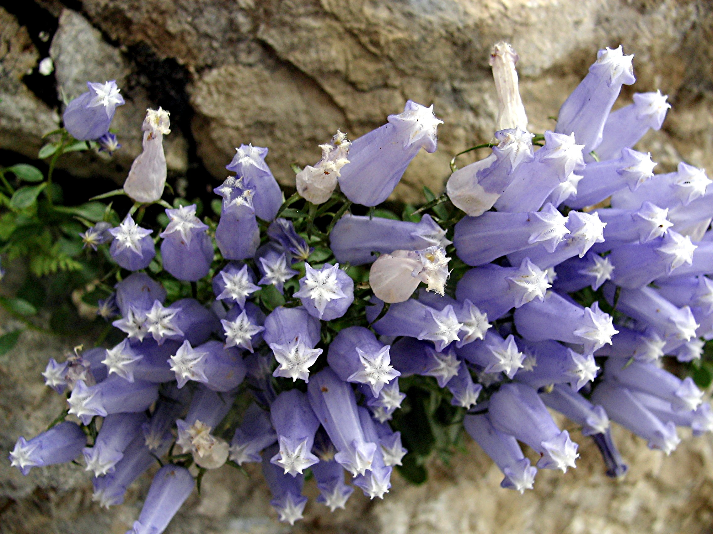 Campanula zoysii, Triglav Mountains, Slovenia